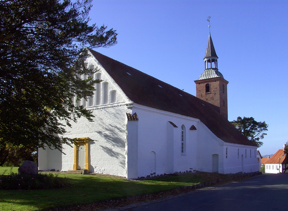 fra nordøst